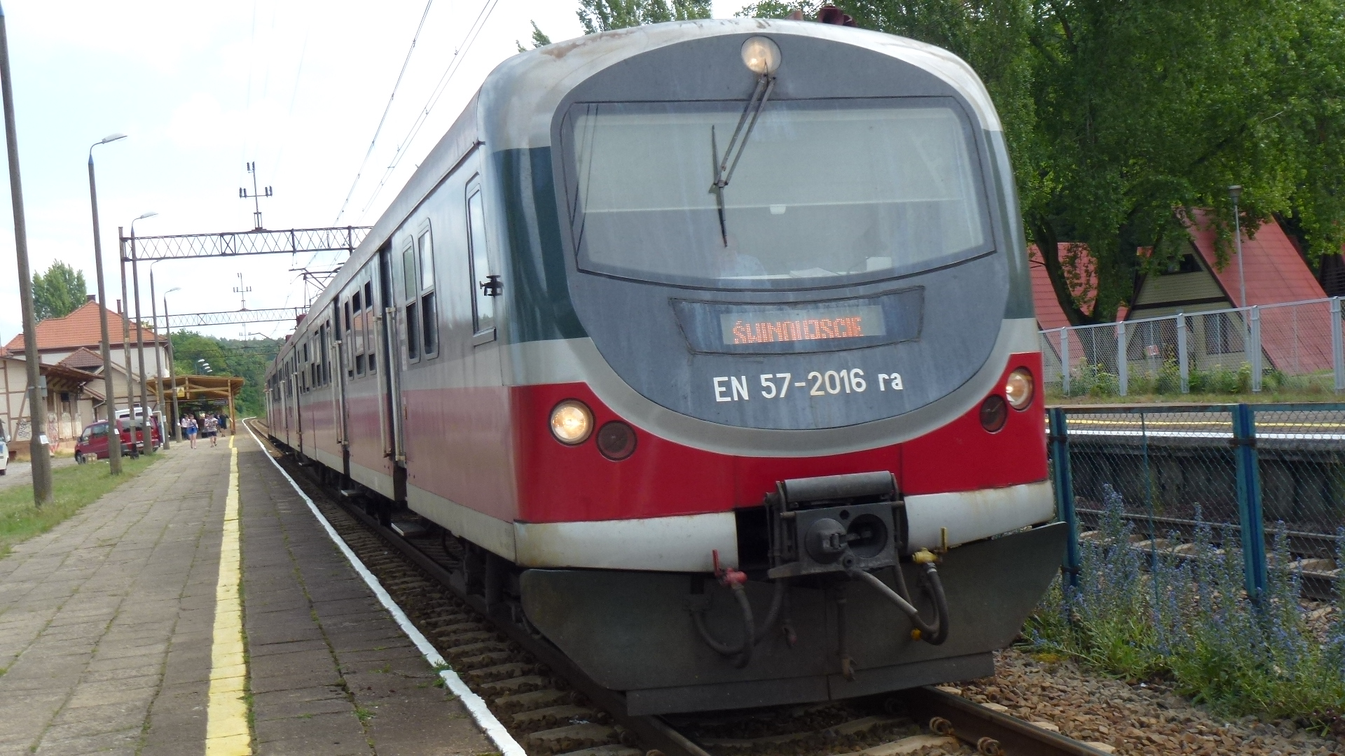 EN57-2016 w Międzyzdrojach